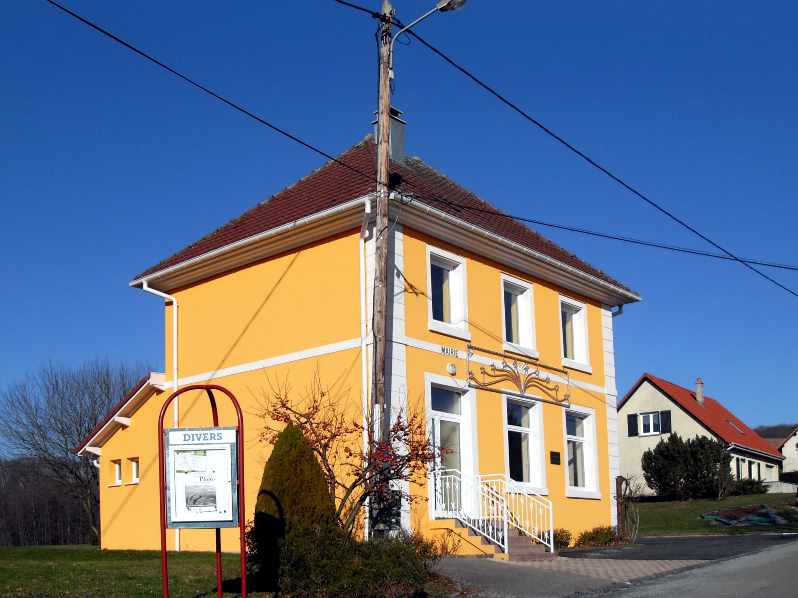 La mairie de Bourg-sous-Châtelet